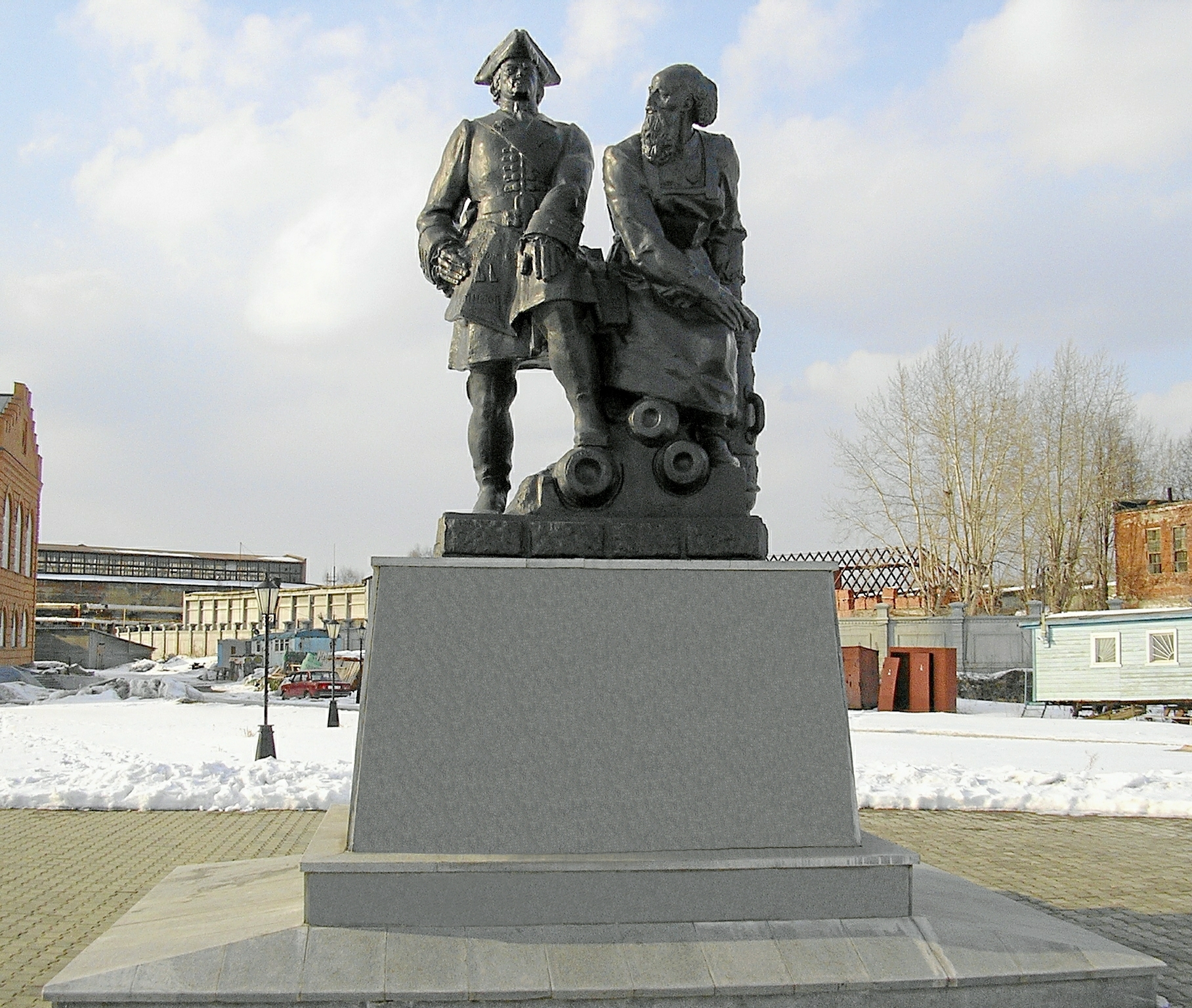 Памятник Петру I и Никите Демидову в Невьянске